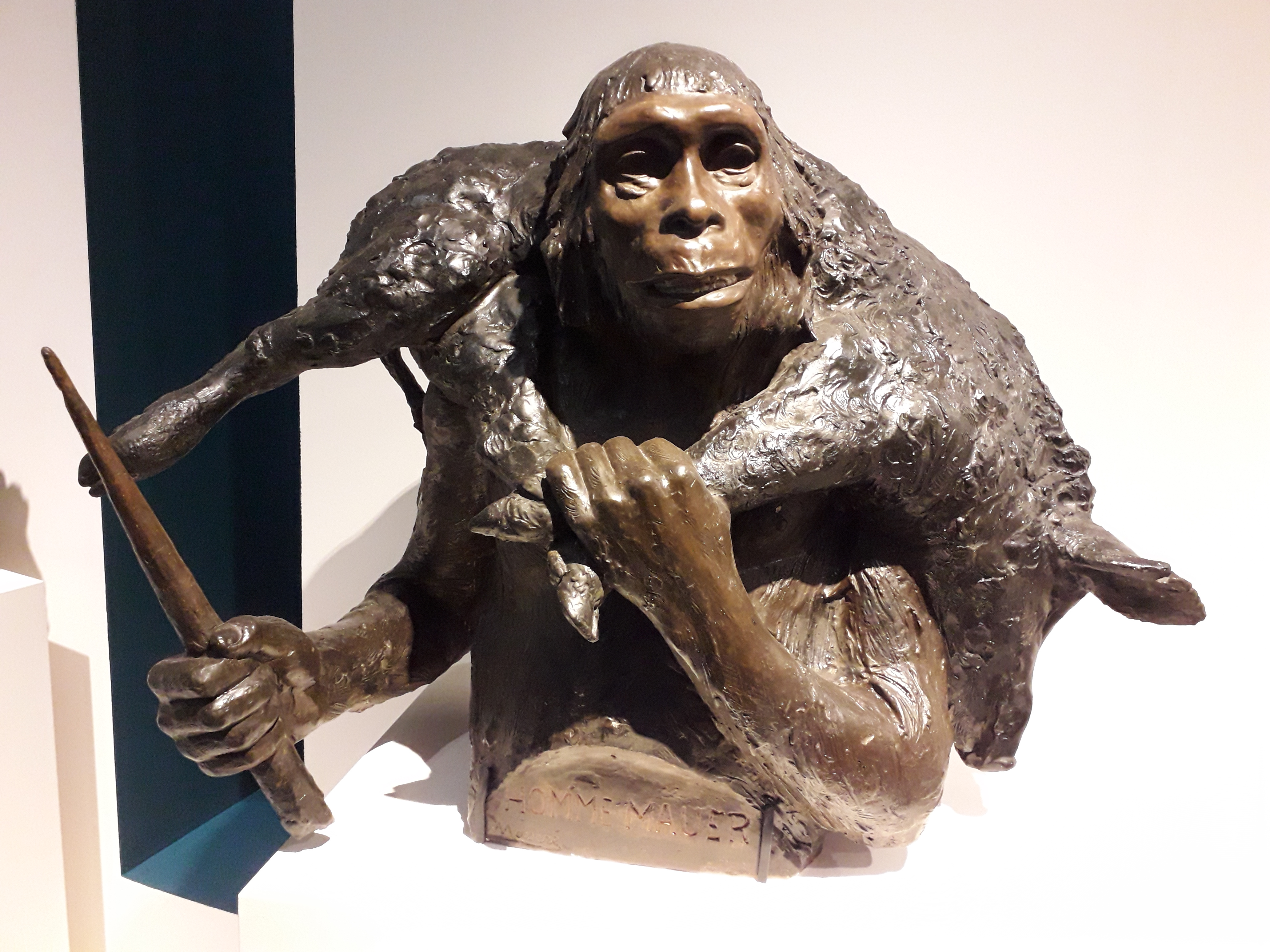 L'Homme de Mauer avec son bâton et son cadavre de sanglier. Buste en plâtre peint. Par Louis Mascré et Aimé Rutot. 1909-1914. Institut royal des Sciences naturelles de Belgique, Bruxelles. Photographié à l'exposition "Néandertal, l'expo" au musée de l'Homme à Paris en avril 2018.